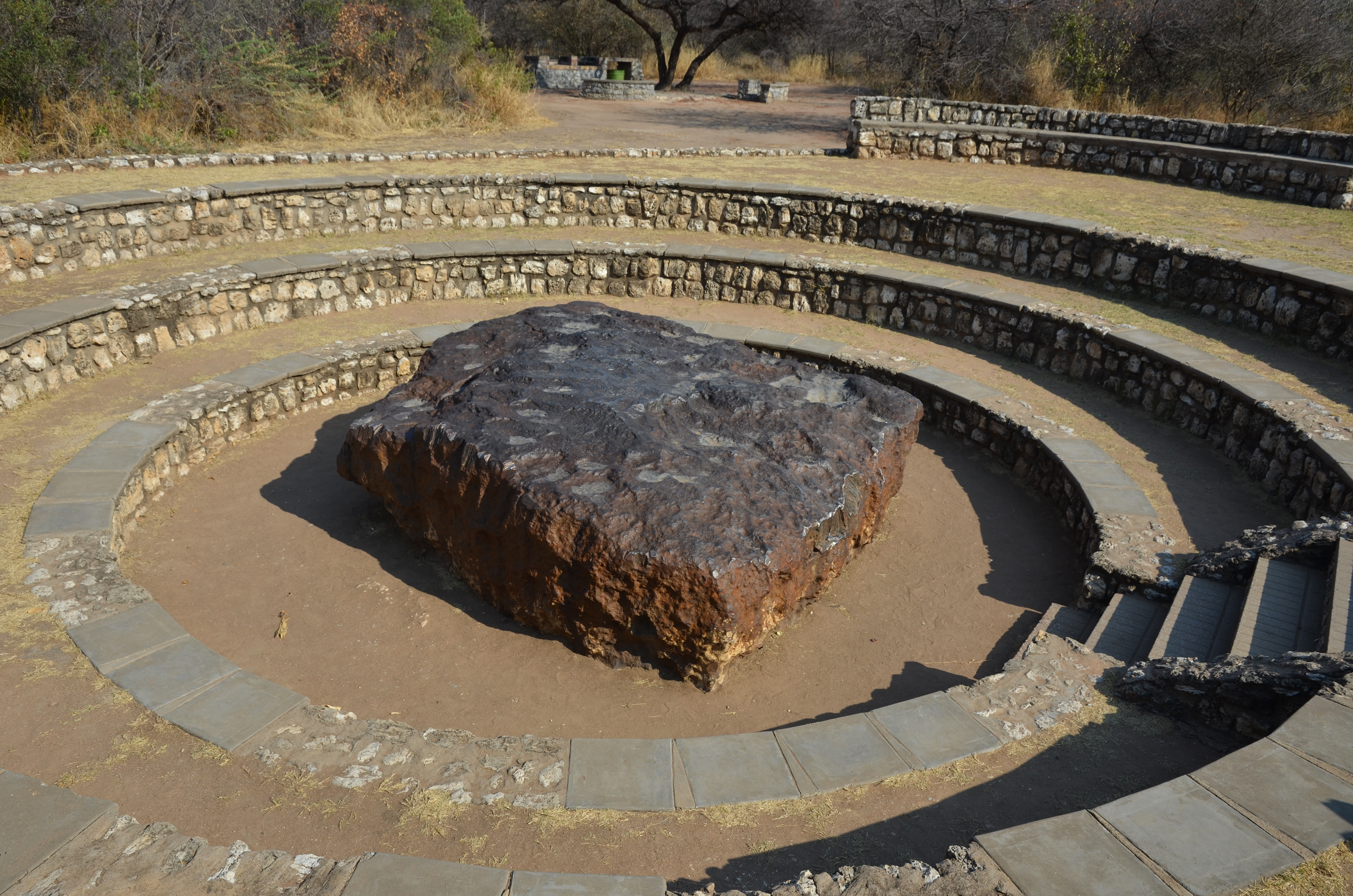 Hoba meteorit, největší meteorit - Namibie